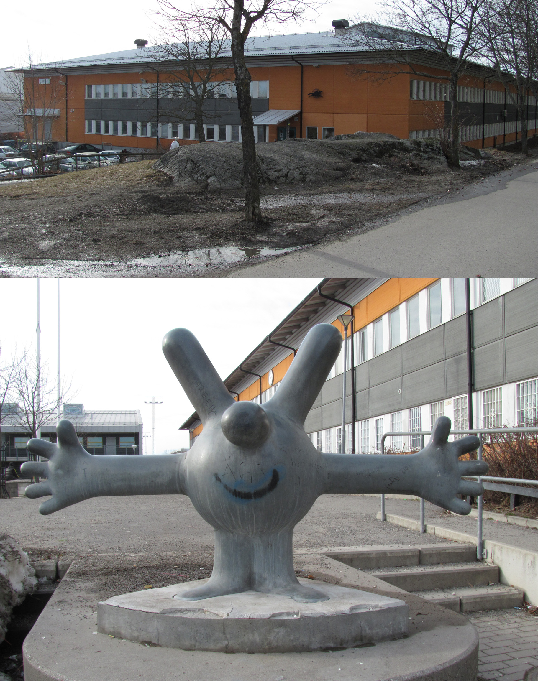 Mr. Happy by Johan Wiking.